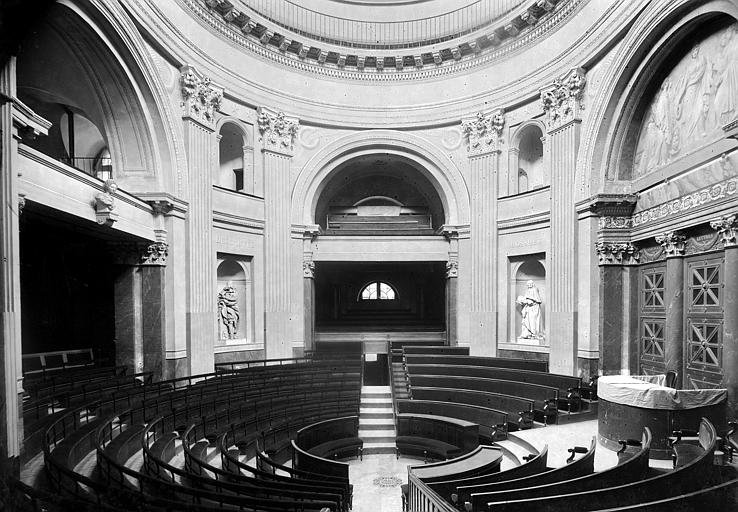 Grande salle de la coupole